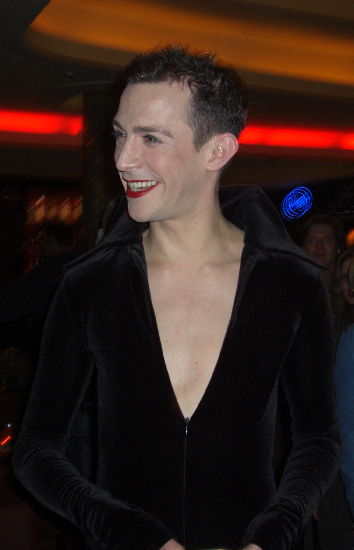 Tim Fischer nach einem Konzert mit Rainer Bielfeld im Hamburger Schmidts (Reeperbahn) mit dem Stück "Zarah ohne Kleid".